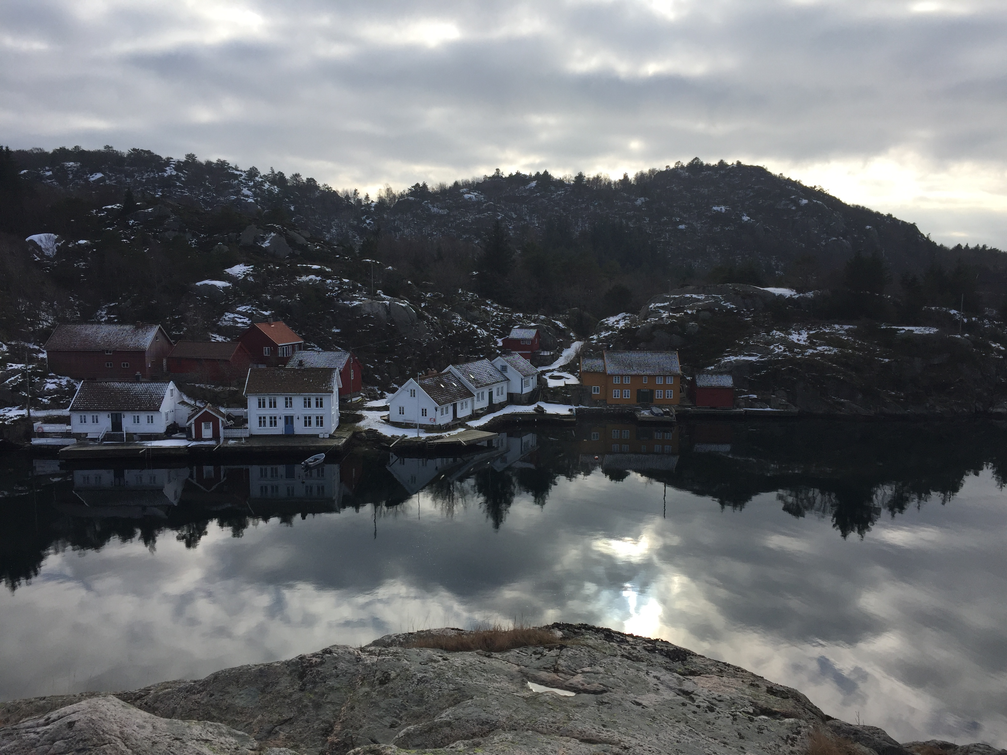 Bebyggelsen i Skjernesund. Bildet tatt mot sør